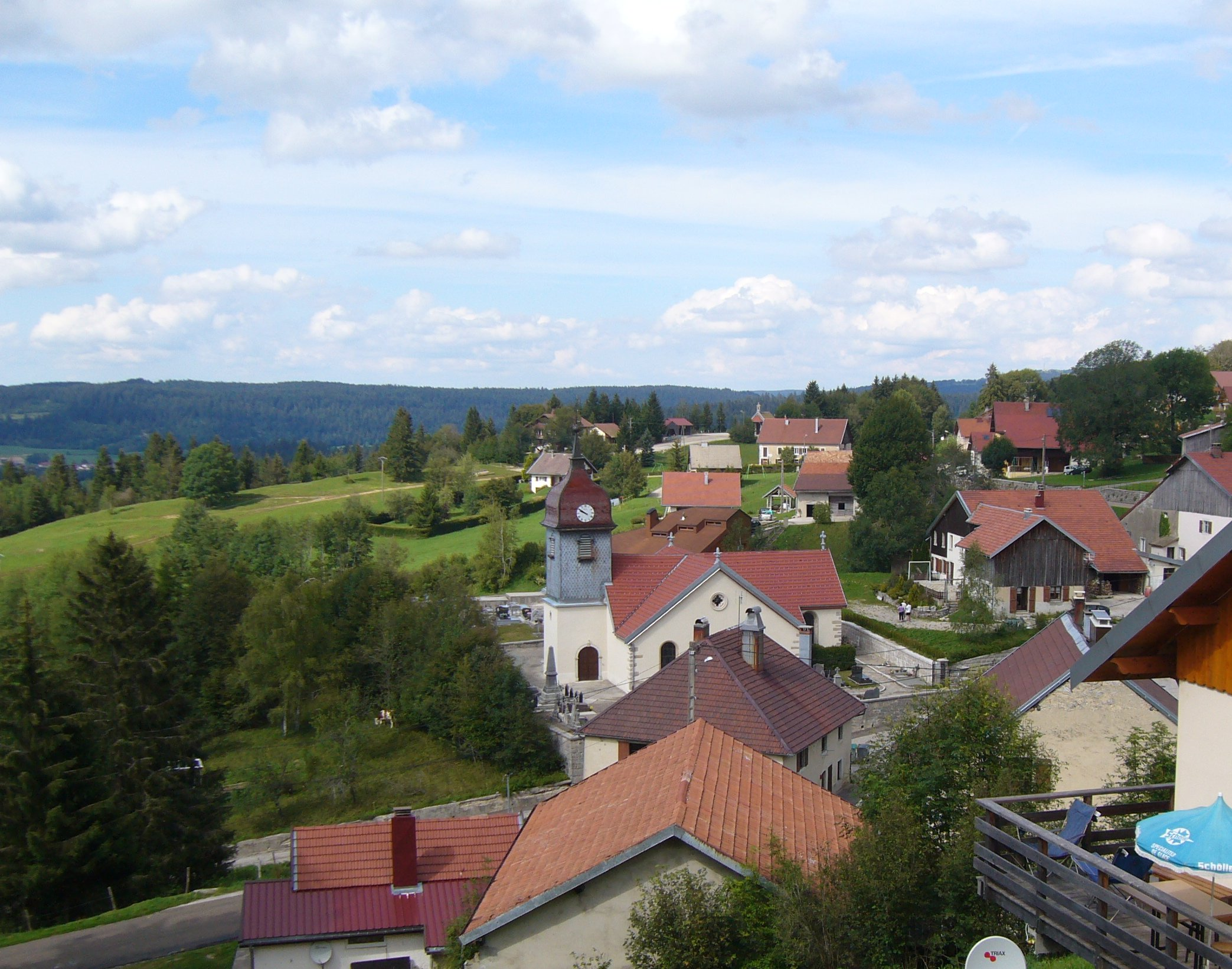 Auteur: Utilisateur:Suaudeau Description: Vue de la commune de Montperreux.